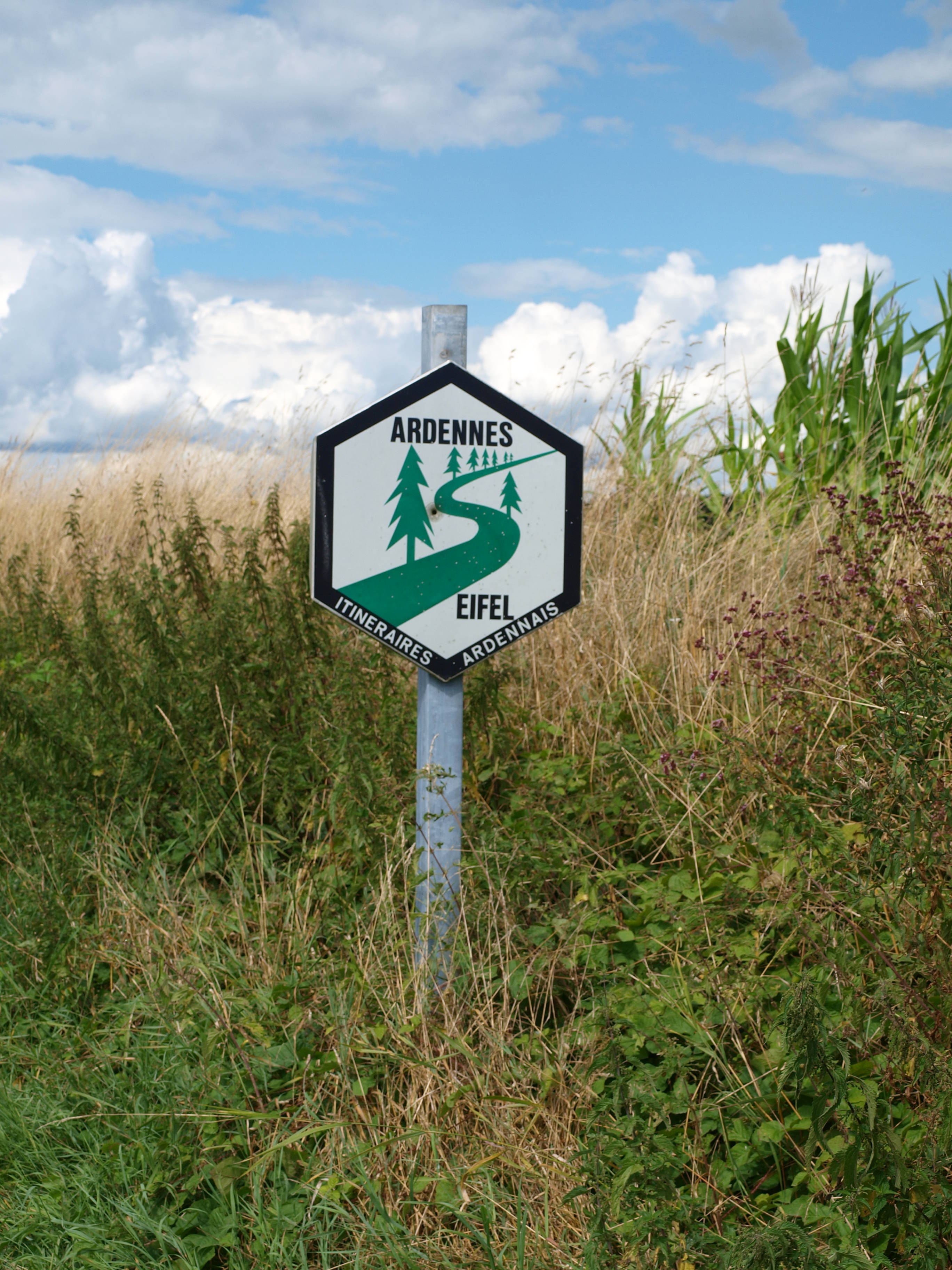 Autry (Ardennes, France) ; panneau du circuit Ardenne-Eifel, route de Grandham.